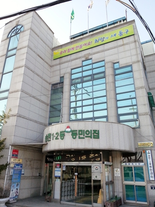 송현1·2동 주민센터